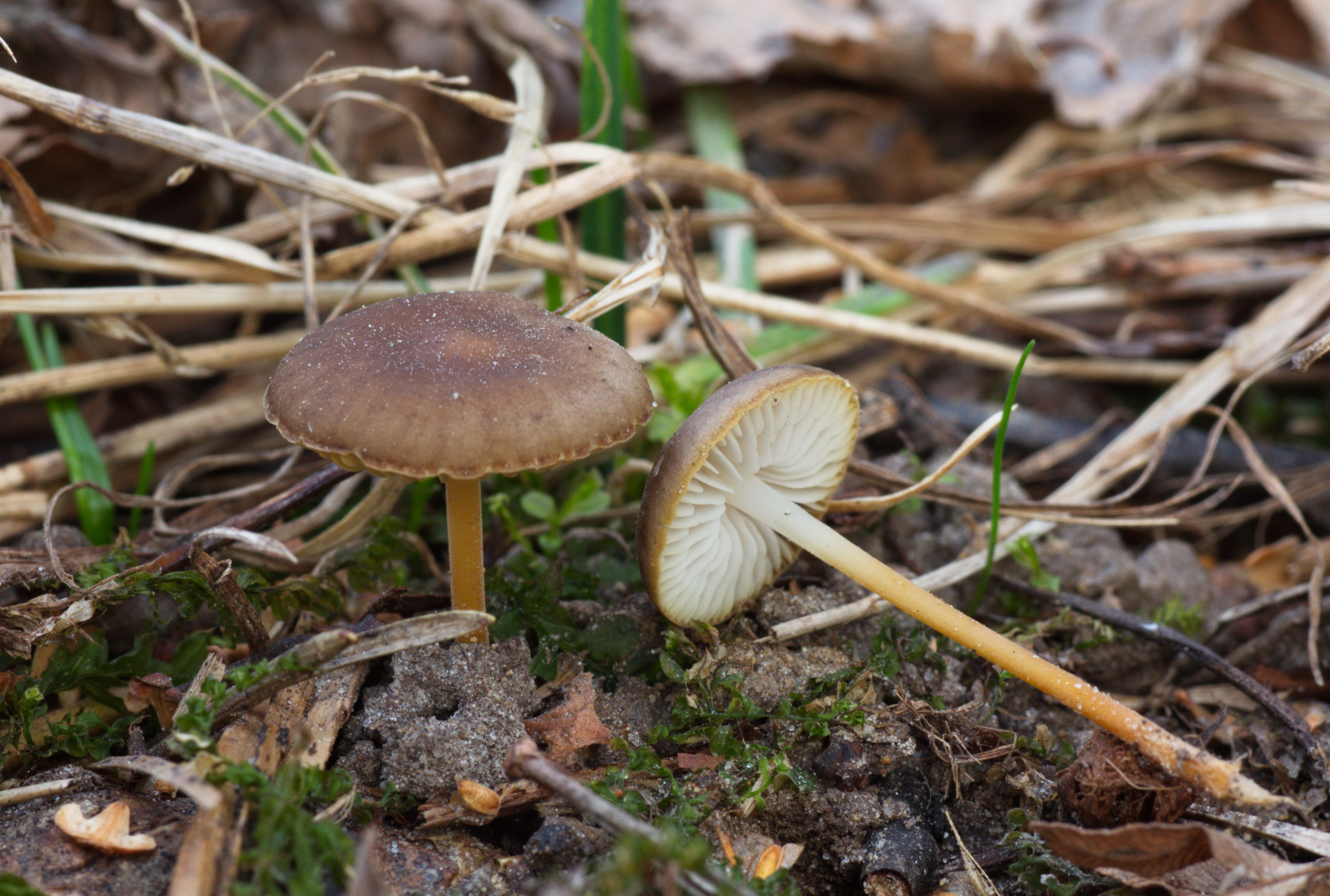 Strobilurus tenacellus (Pers.) Singer